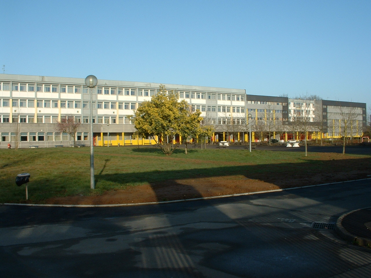 Vue du lycée Jean-Perrin